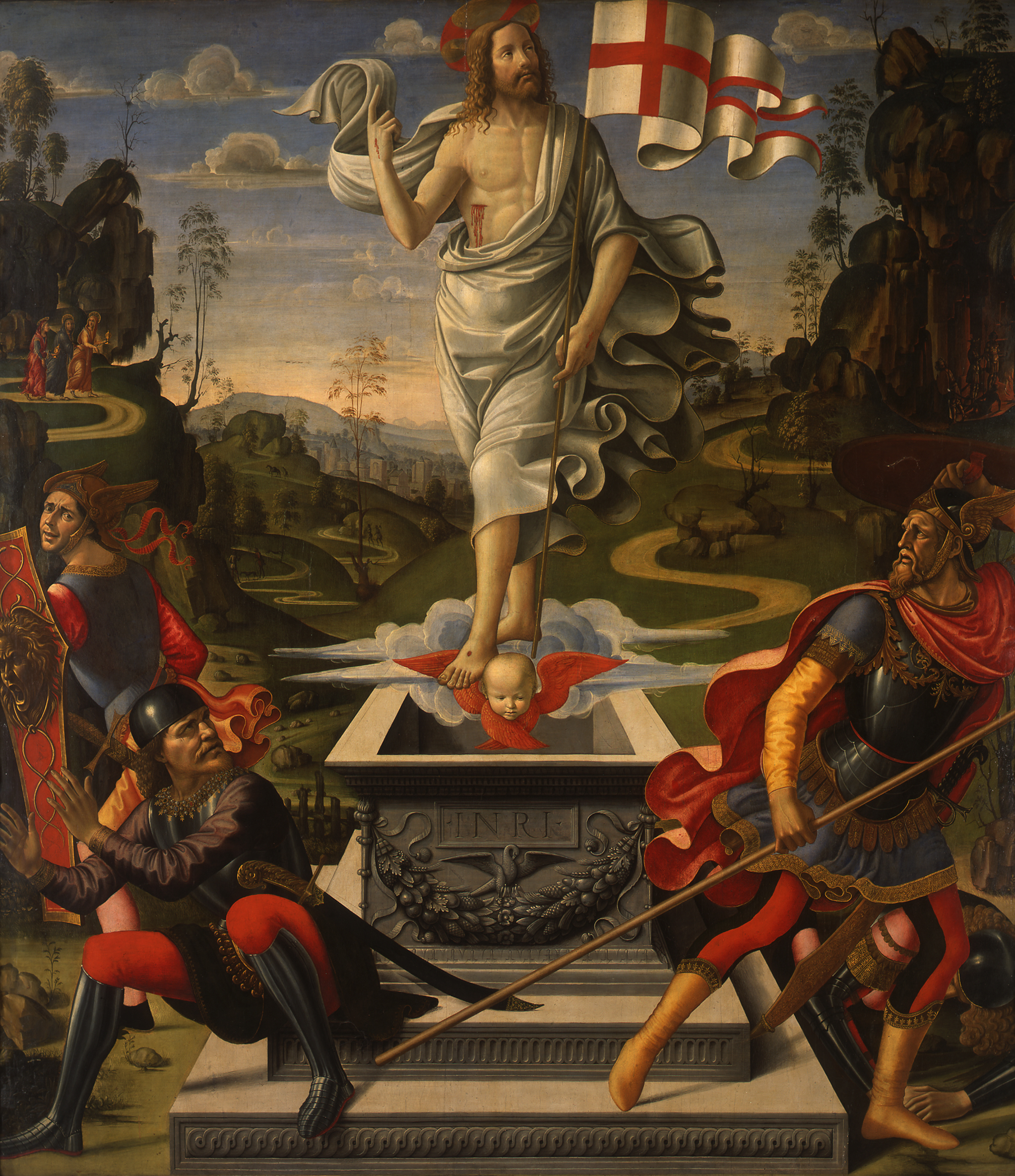 GHIRLANDAIO, Domenico Resurrezione di Cristo Gemäldegalerie, Berlin